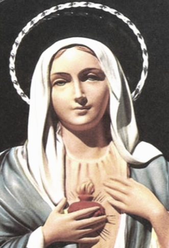 シラクサの涙の聖母